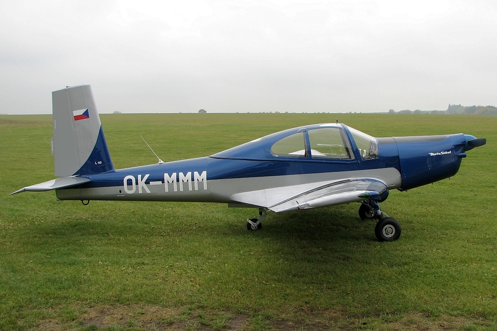 Výrobní číslo 150608, r.v. 1958